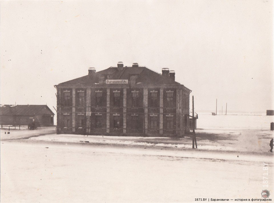 Вуліца Чыгуначная 14 (1913)